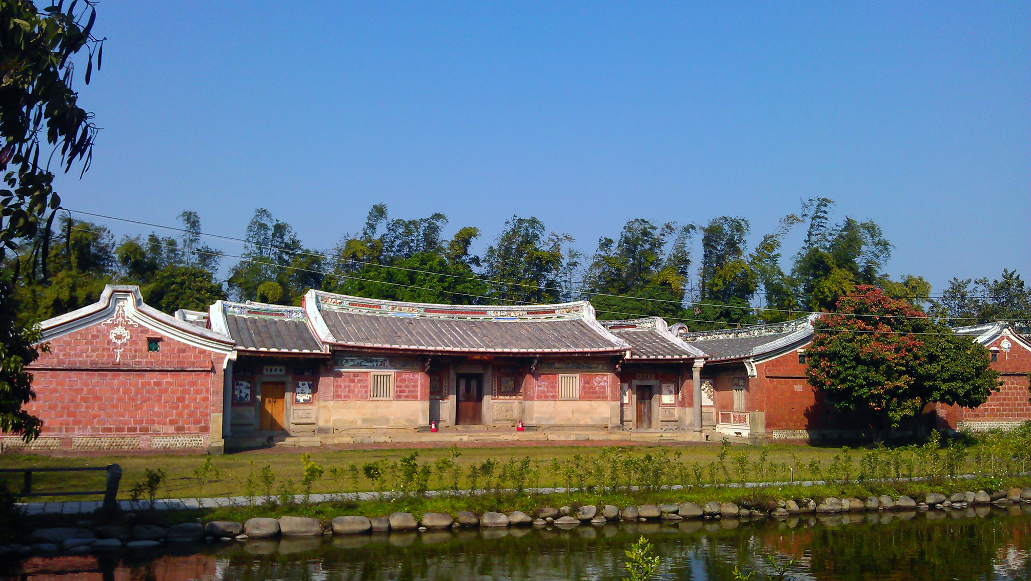 中文（台灣）: 潭子摘星山莊